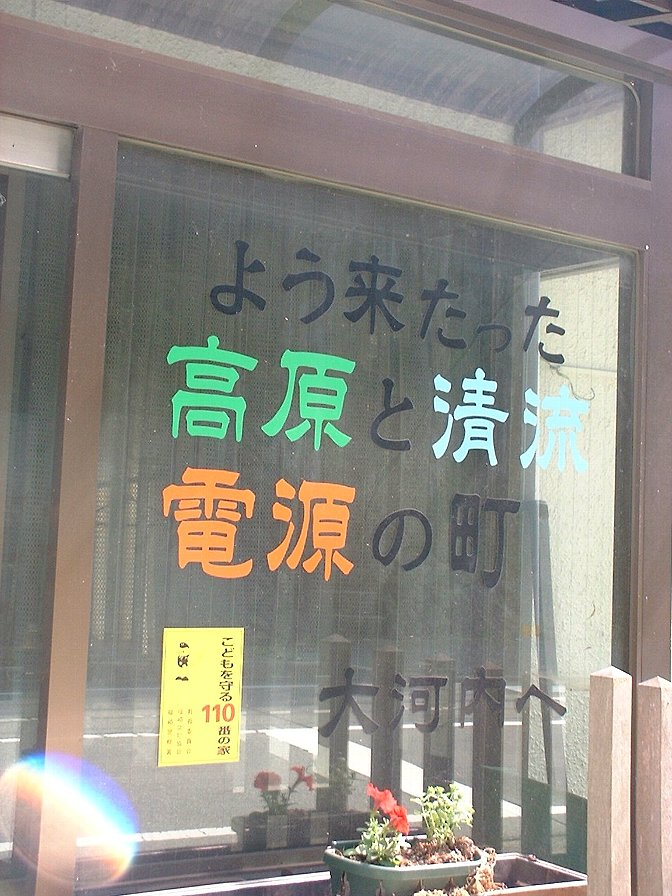 播州弁の一例（北播磨での用法） 大河内町（現・神河町）にて